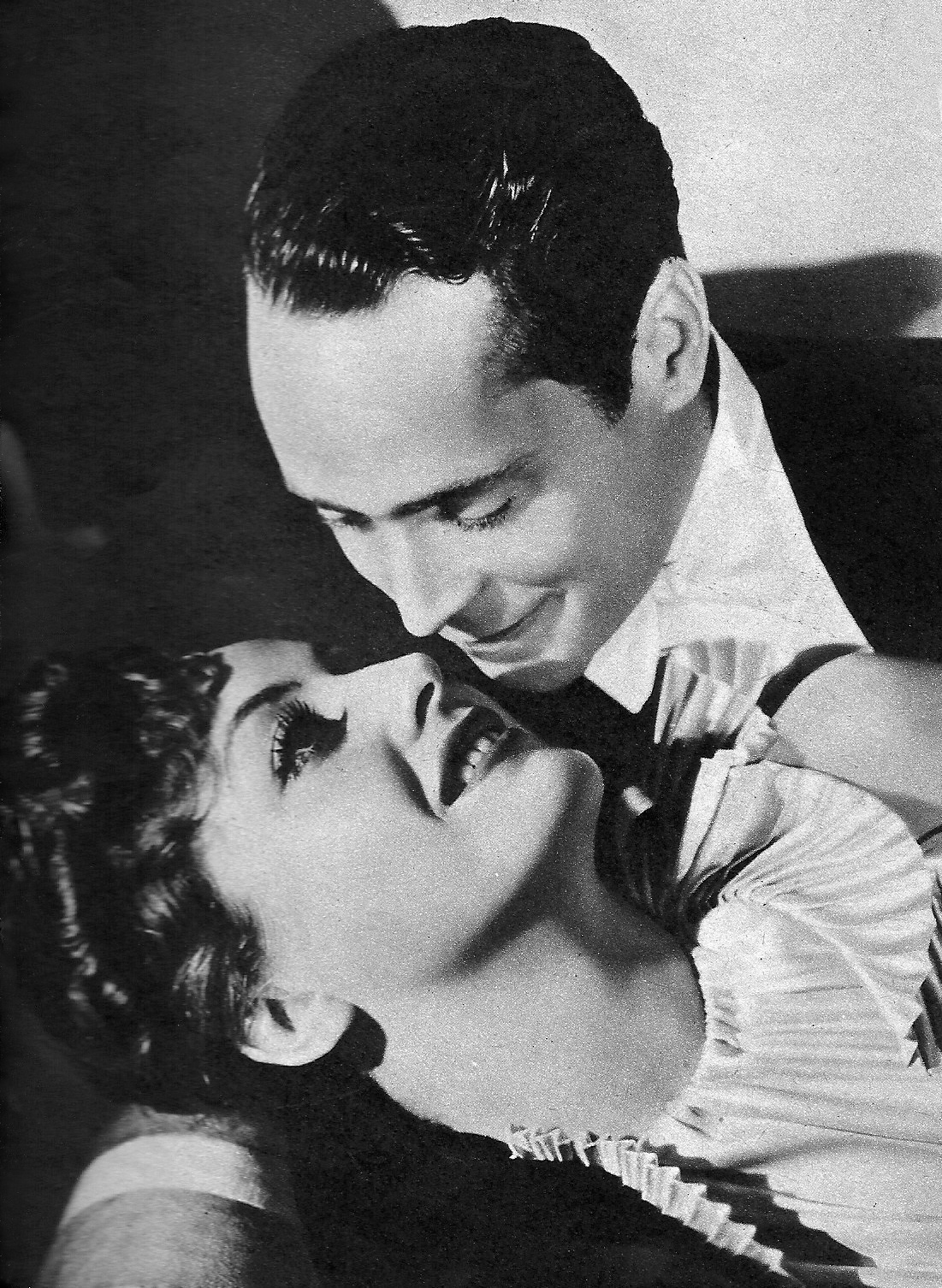 Joan Crawford e Franchot Tone nel film "La danza di Venere" ("Dancing Lady")